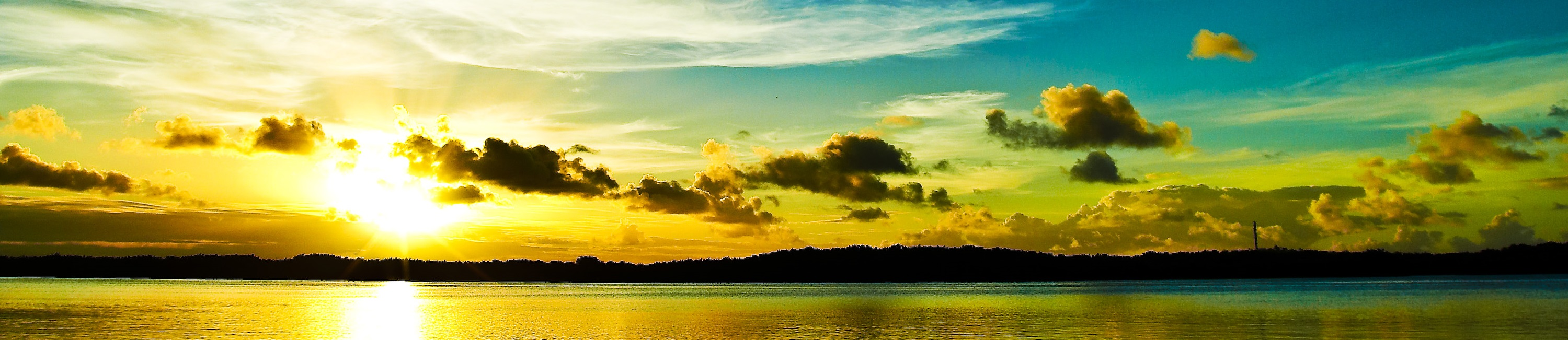 Rio Potenji em Natal - Rio Grande do Norte, Brasil.